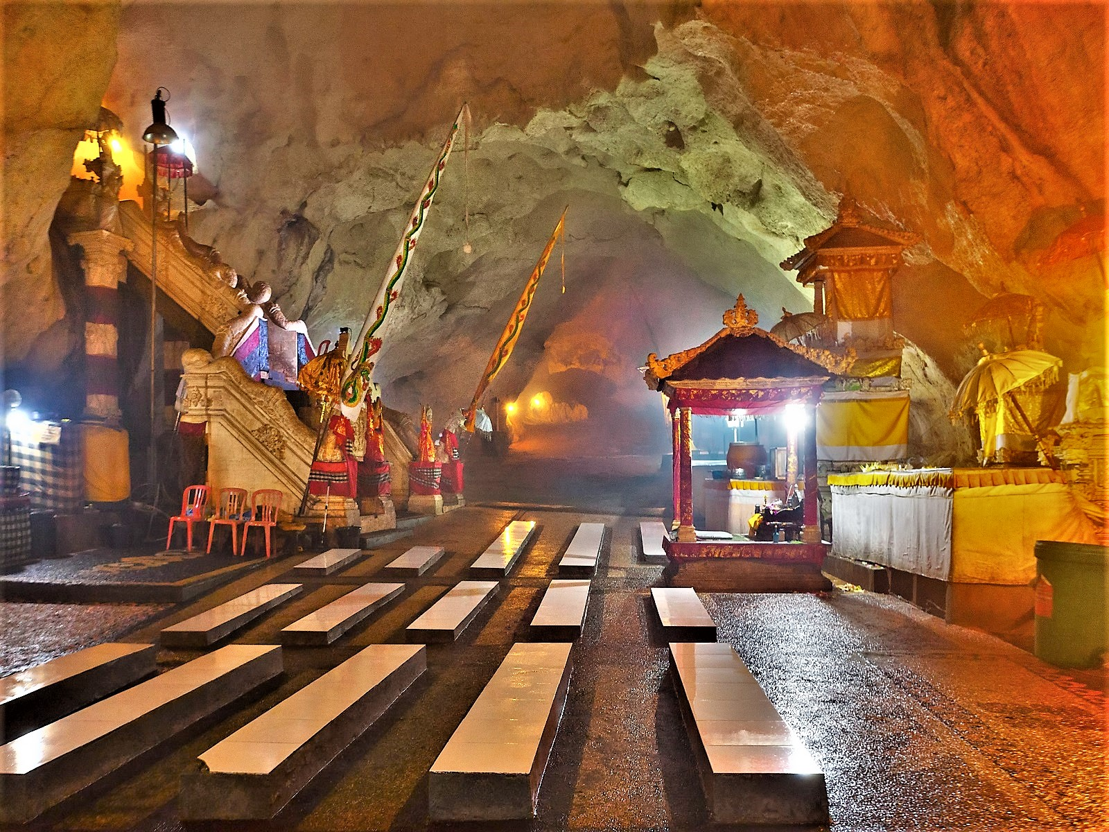 ギリプトゥリ洞窟にある寺院